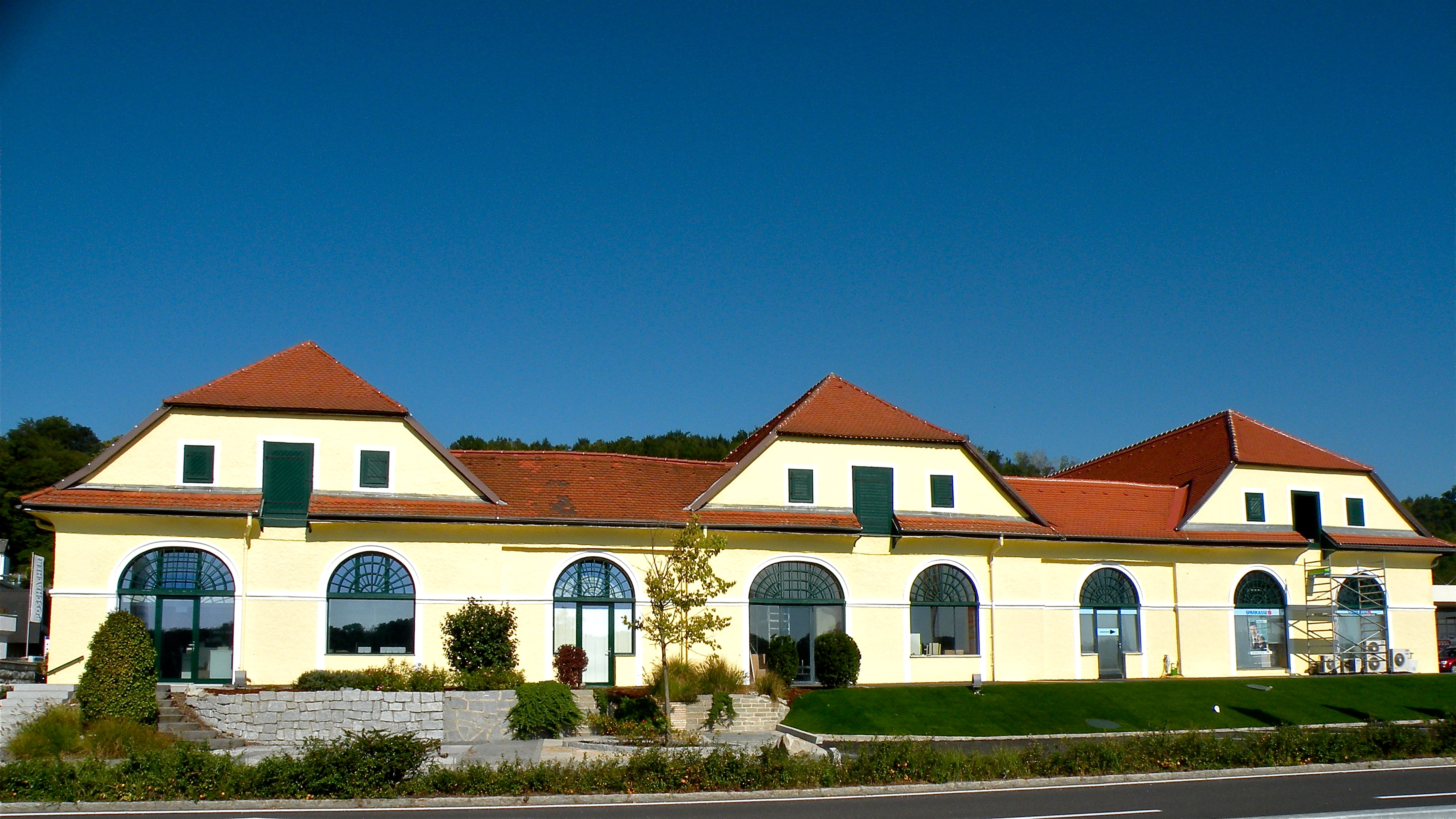 Mauthausen Ehemaliger Salzstadl